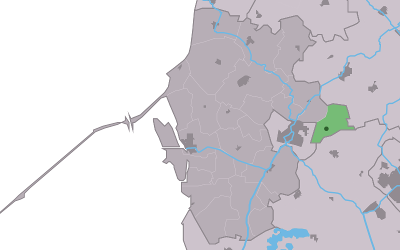 Kaartsje fan himrik fan Hartwert